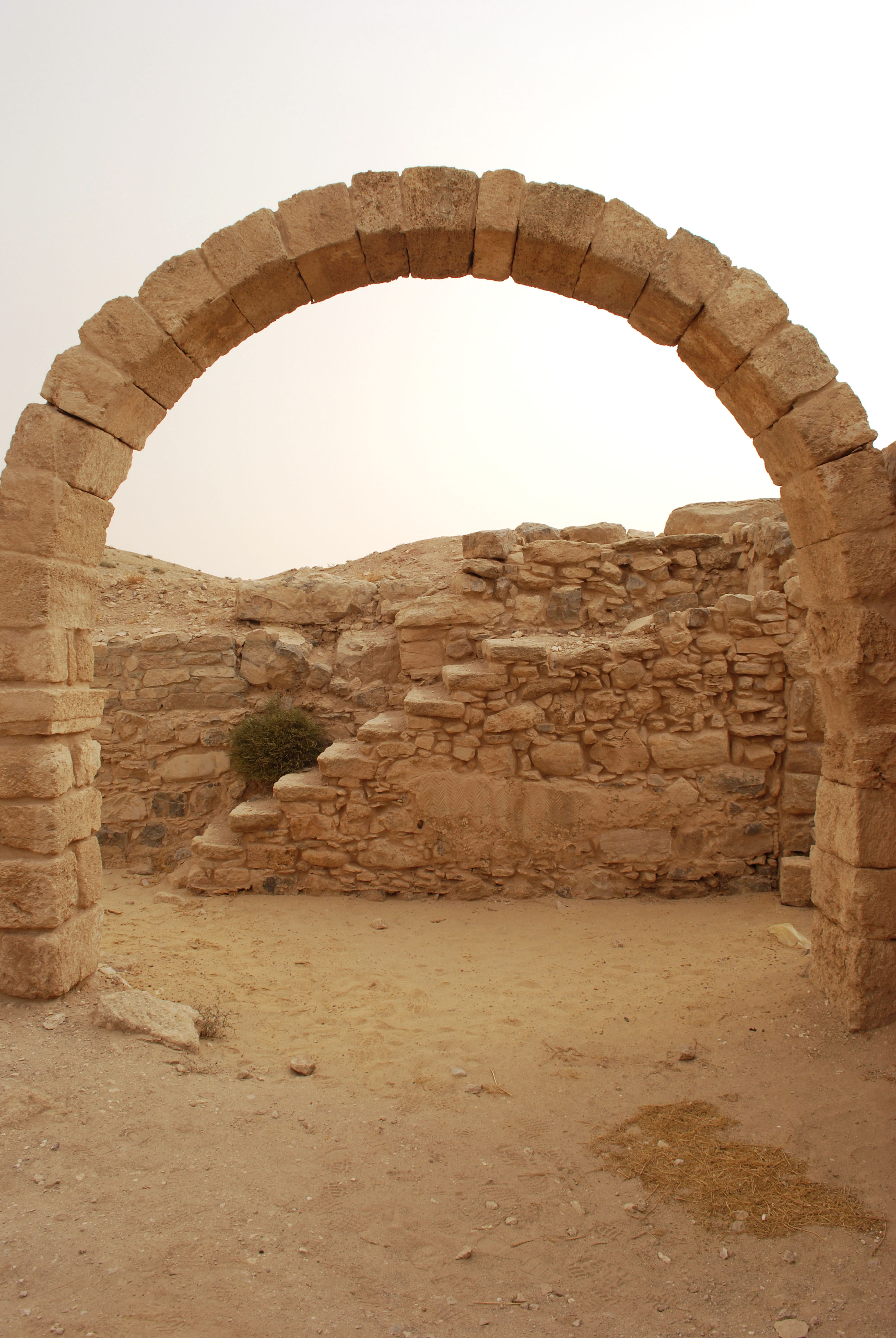 Vue des vestiges de la ville de Umm ar-Rasas.